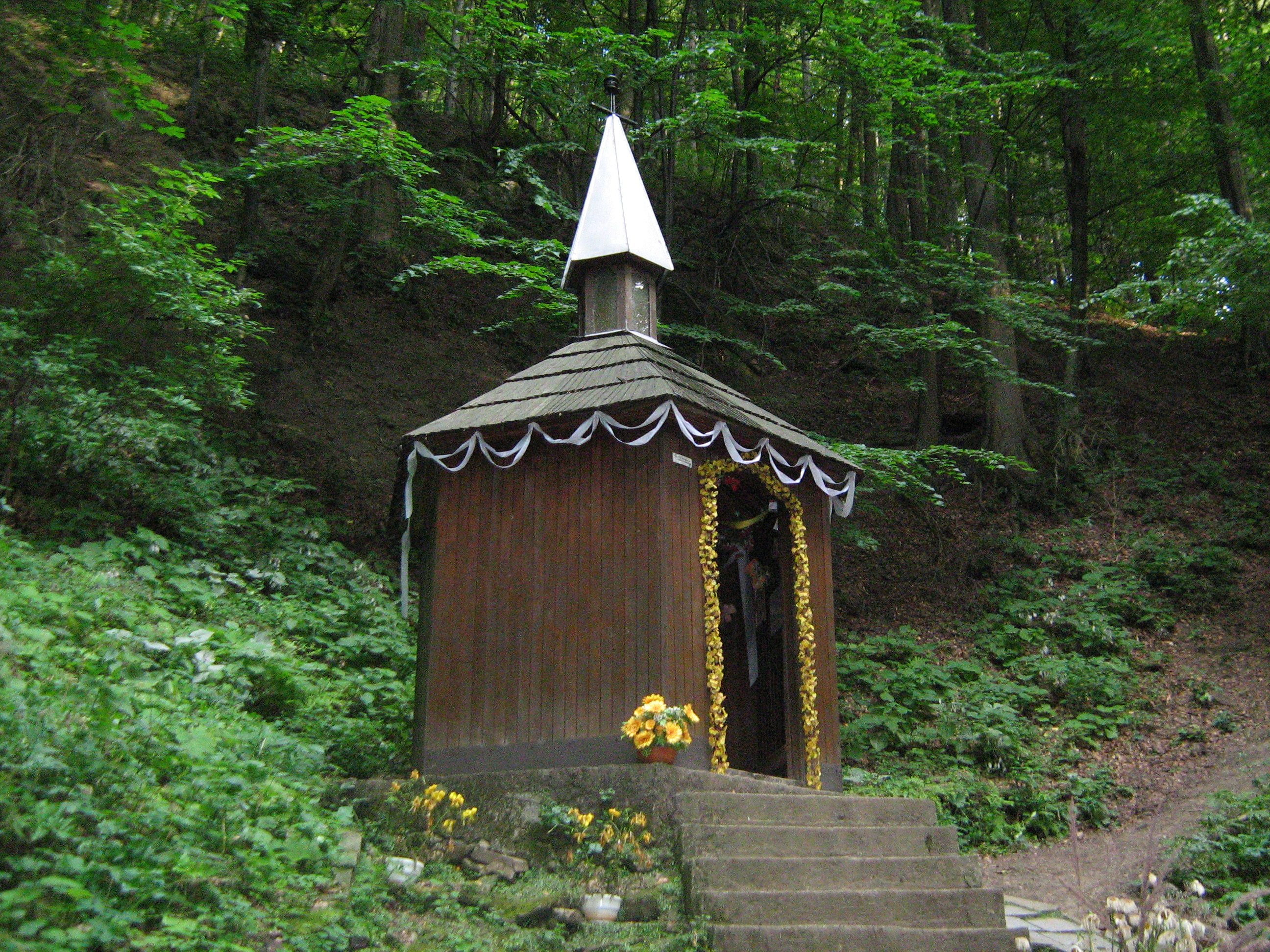 Kapliczka na górze Cergowa (pow. krośnieński) w miejscu gdzie mieszkał św. Jan z Dukli